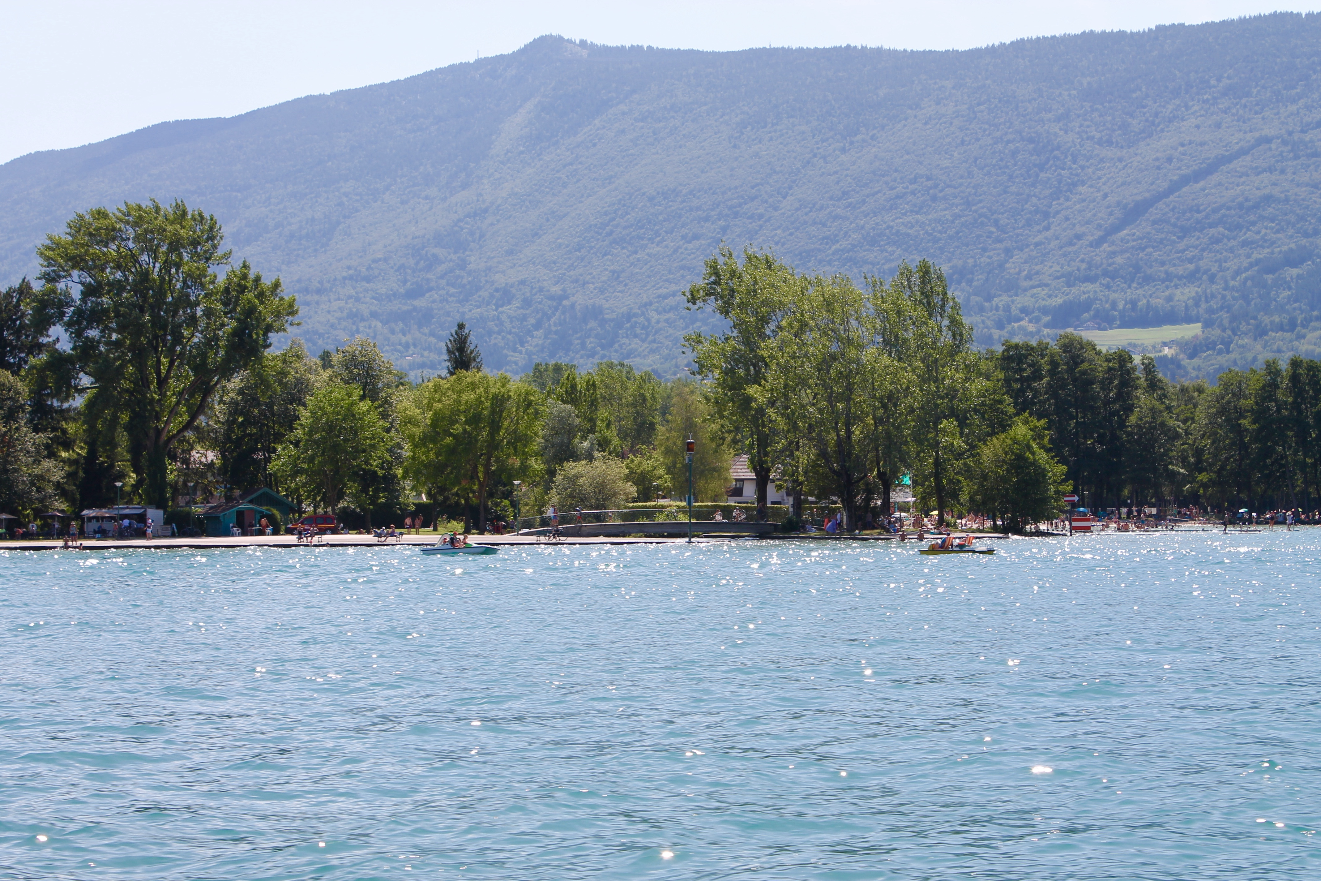 Embouchure du Laudon et l'esplanade de l'Espérance (2019).